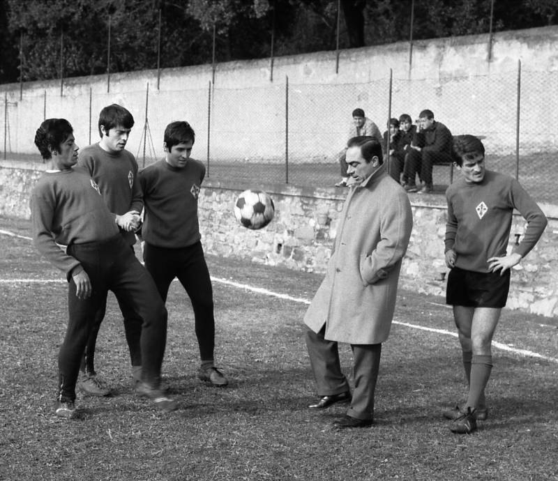 A moment of relax during a training session of A.C. Fiorentina, circa 1968; from left to right: Amarildo Tavares da Silveira, Claudio Merlo, Giancarlo De Sisti, coach Bruno Pesaola and Francesco Rizzo.